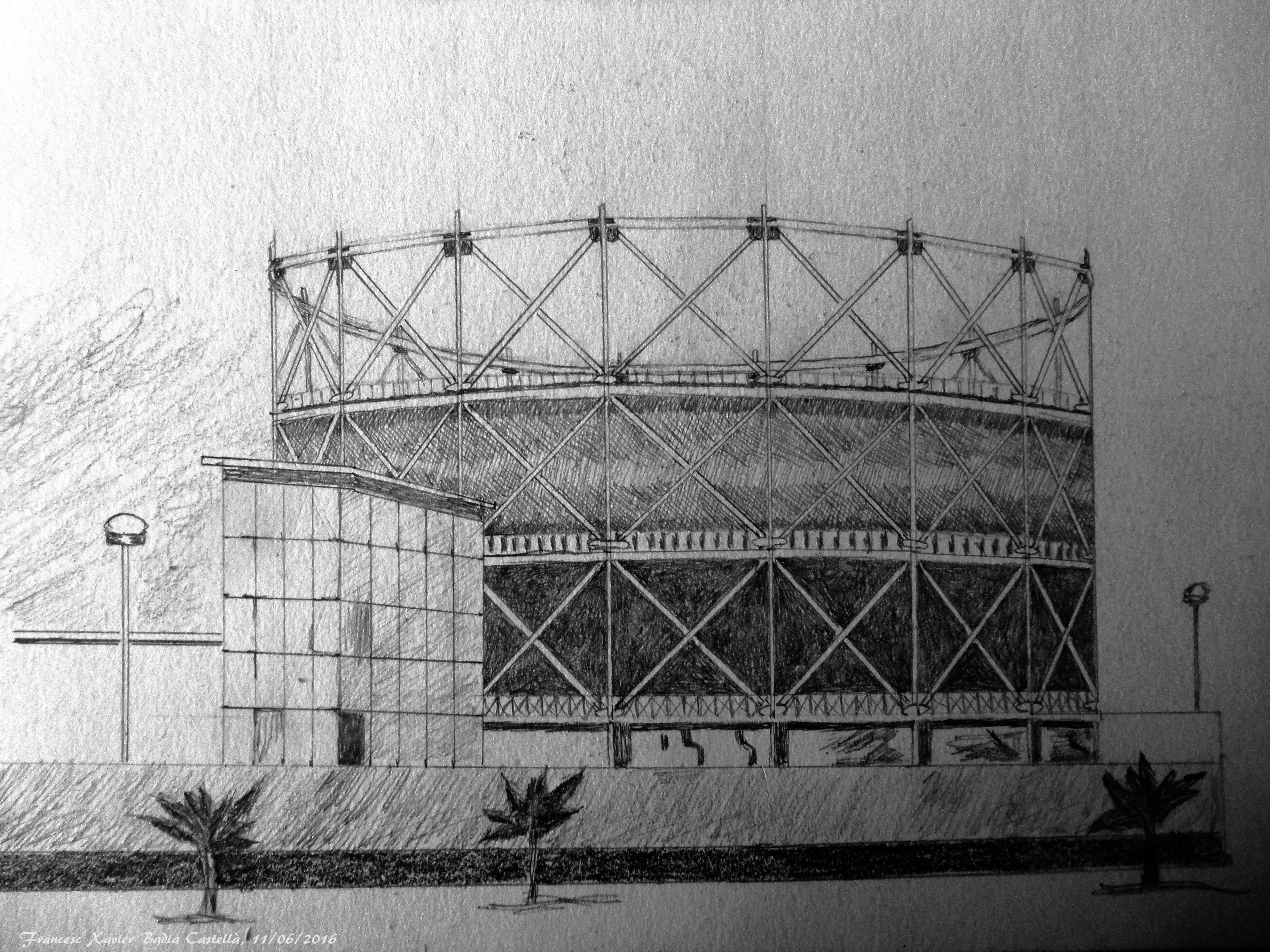 1911-Taulat 114. Lebón i Companyia., fàbrica de gas. 1924-Companyia del Gas Lebón de Sant Martí. Catalana de Gas i Electricitat, fàbrica. 1963-Taulat 140-146. Catalana de Gas i Electricitat S.A., fàbrica de gas i electricitat. "Dipòsit de gas Hidràulic" 1964-Taulat 140-146, a la platja del Poblenou. Catalana de Gas i Electricitat tanca i desmonta la fàbrica de gas al Poblenou.